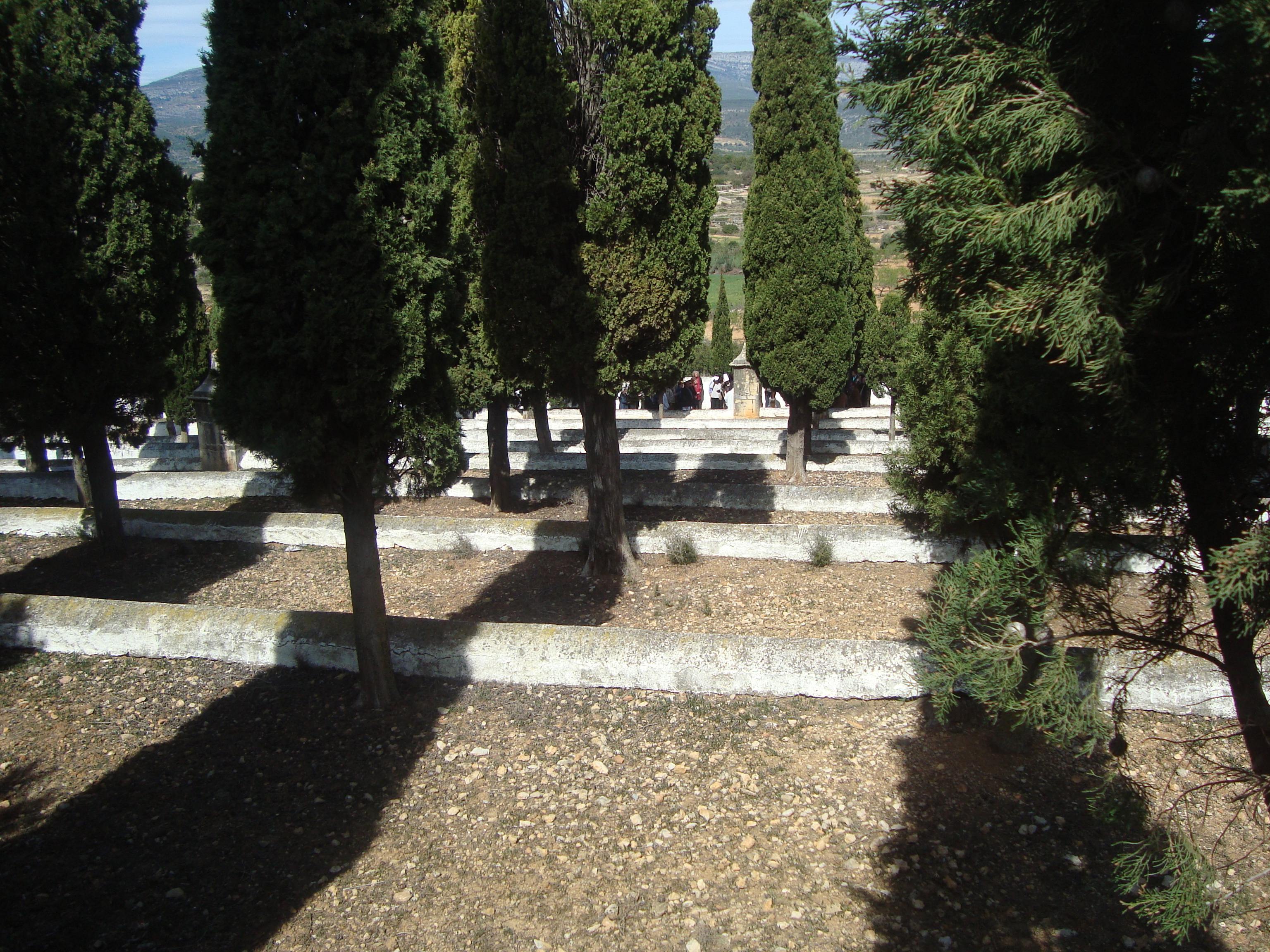 Recinto del Calvario de Villanueva de Alcolea